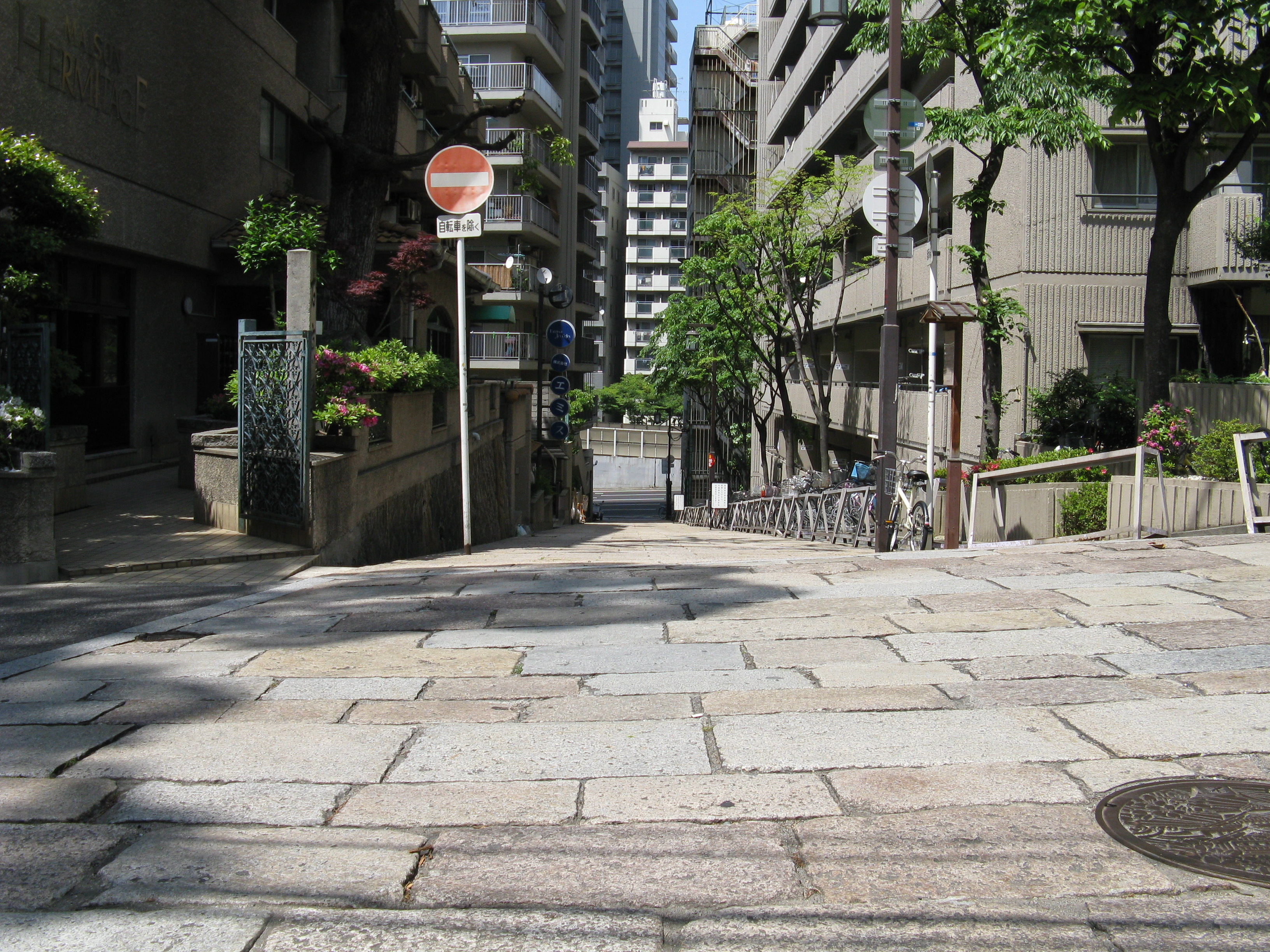 真言坂（天王寺七坂のひとつ）